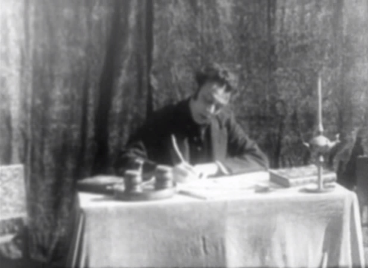 Fotograma de La creación del himno